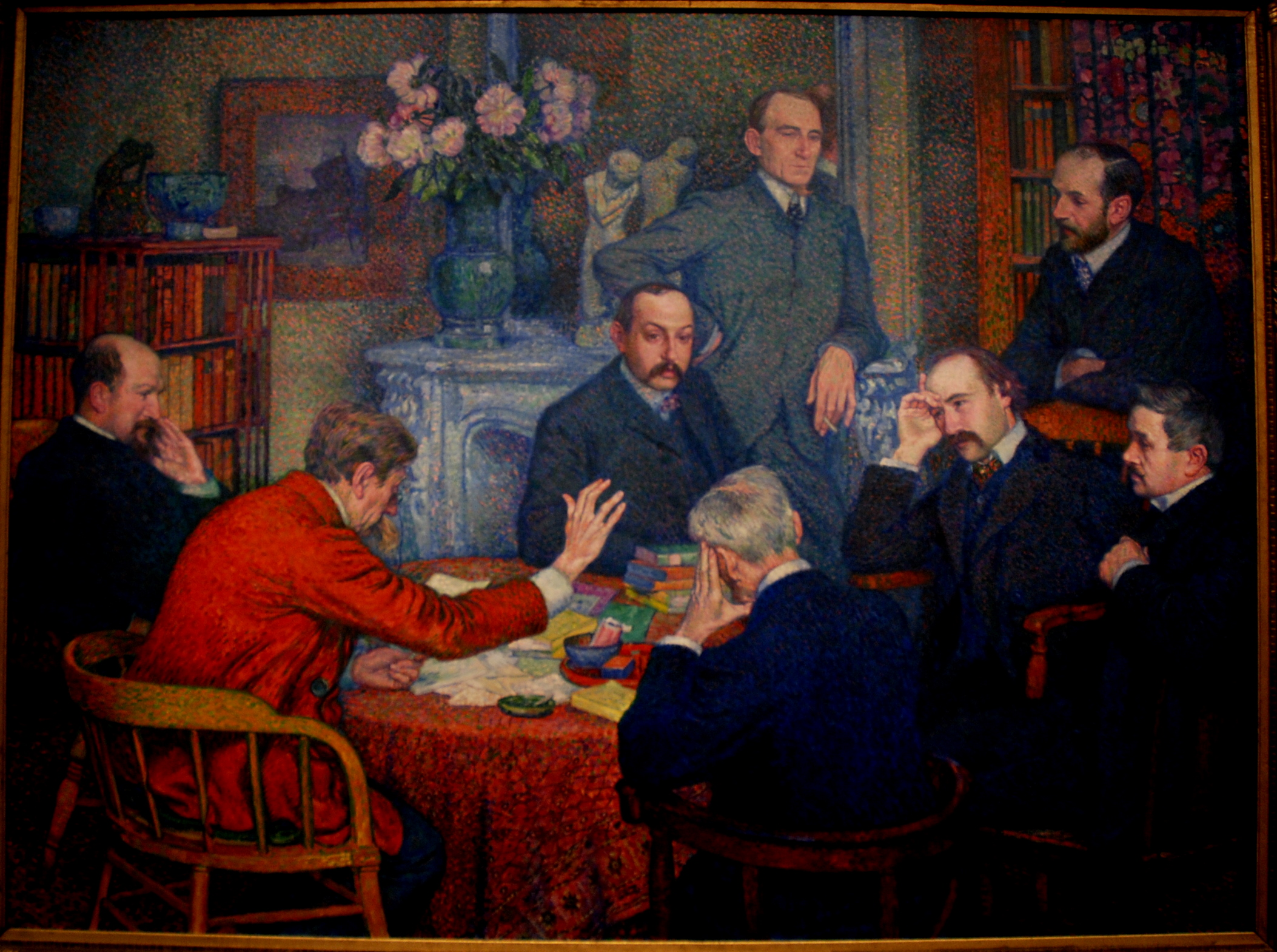 De lezing door Emile Verhaeren door Théo Van Rysselberghe, Vlaams schilder (impressionist) in het Museum voor Schone Kunsten (Gent)